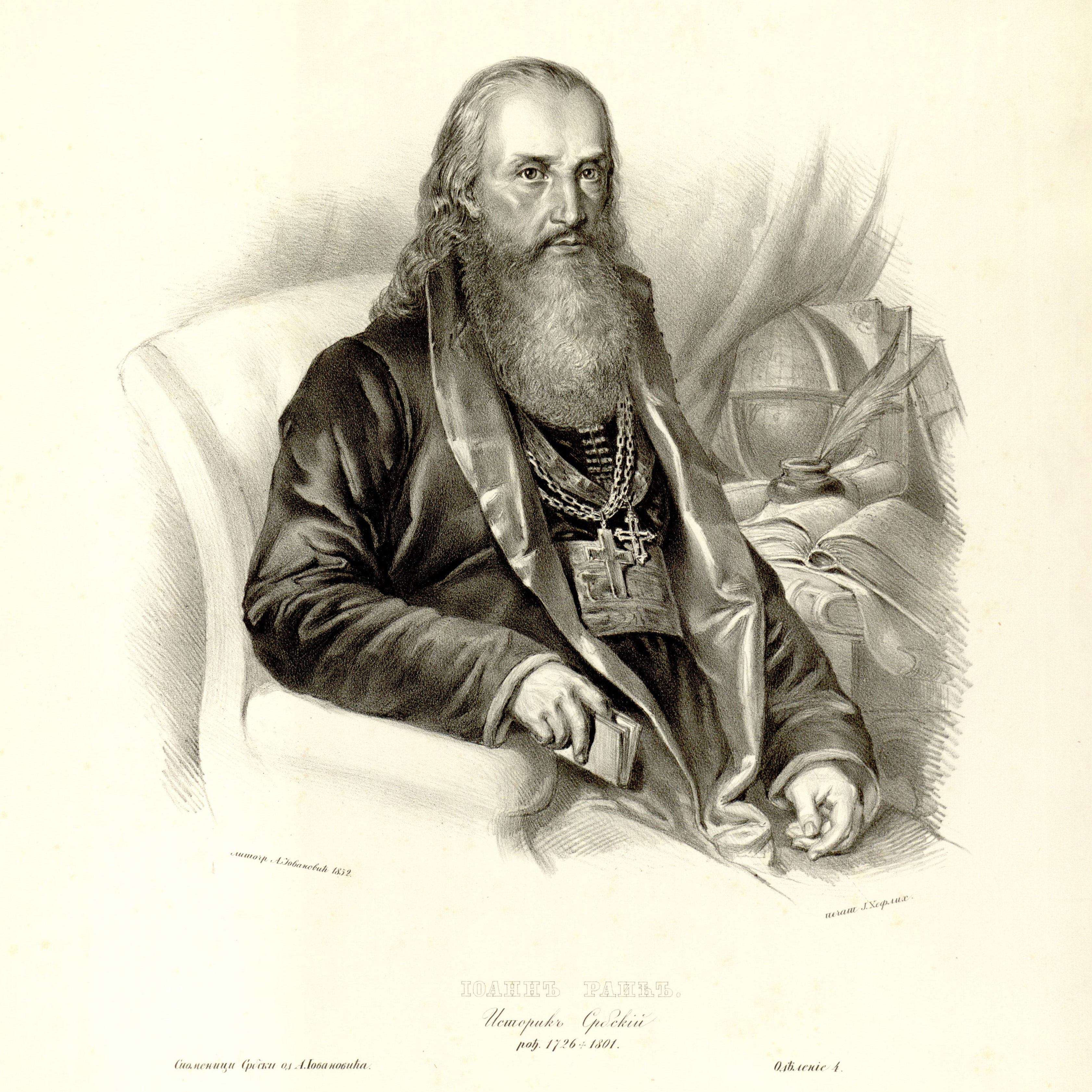 Lithograph of Jovan Rajić by Anastas Jovanović. Caption: литогр. А. Іовановић 1852.печат Ј. Хефлих. ІОАННЪ РАИЋЪ Историкъ Србскій рођ. 1726.+1801. Споменици Србски од А. Іовановића.Одѣленіе 4.